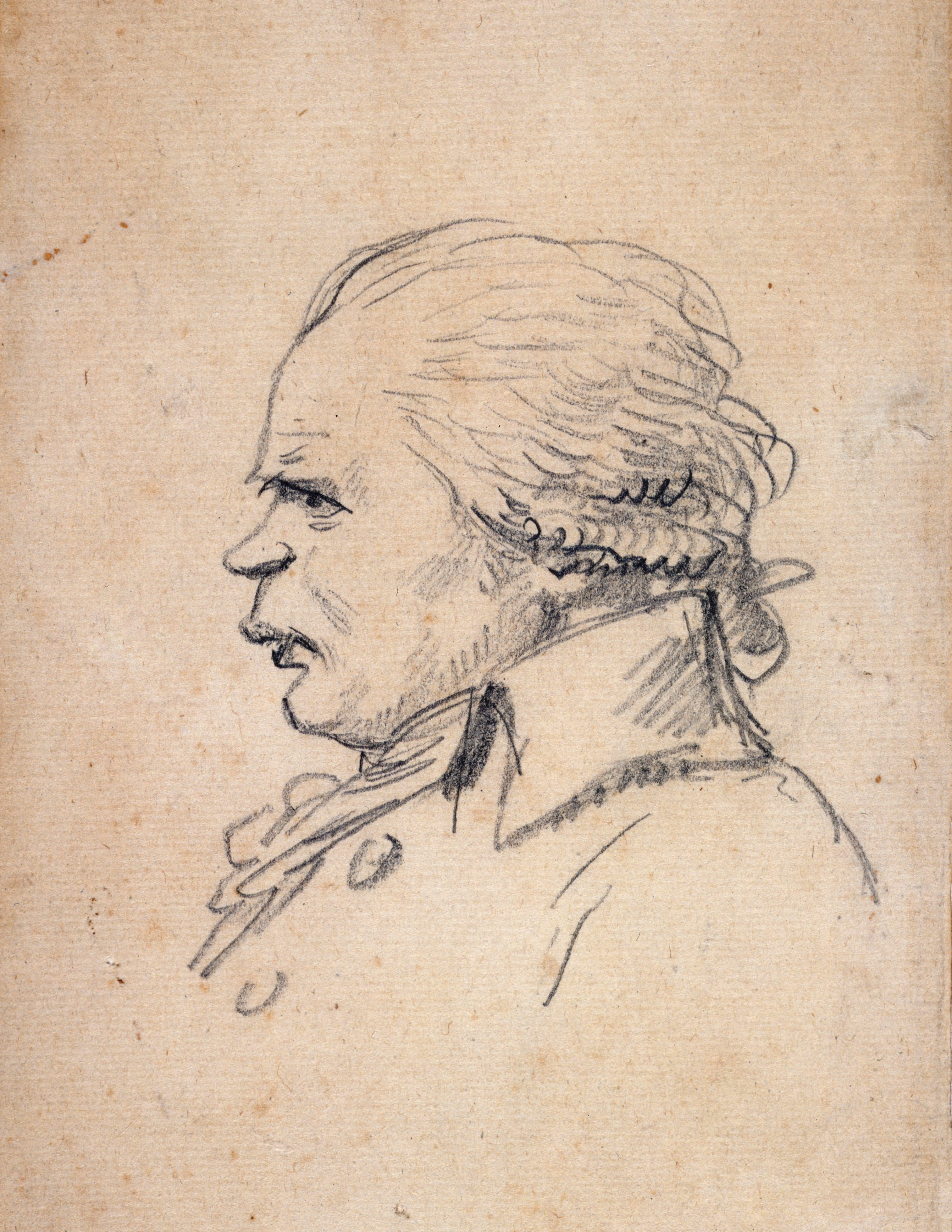 Croquis de Danton à la Convention par David.